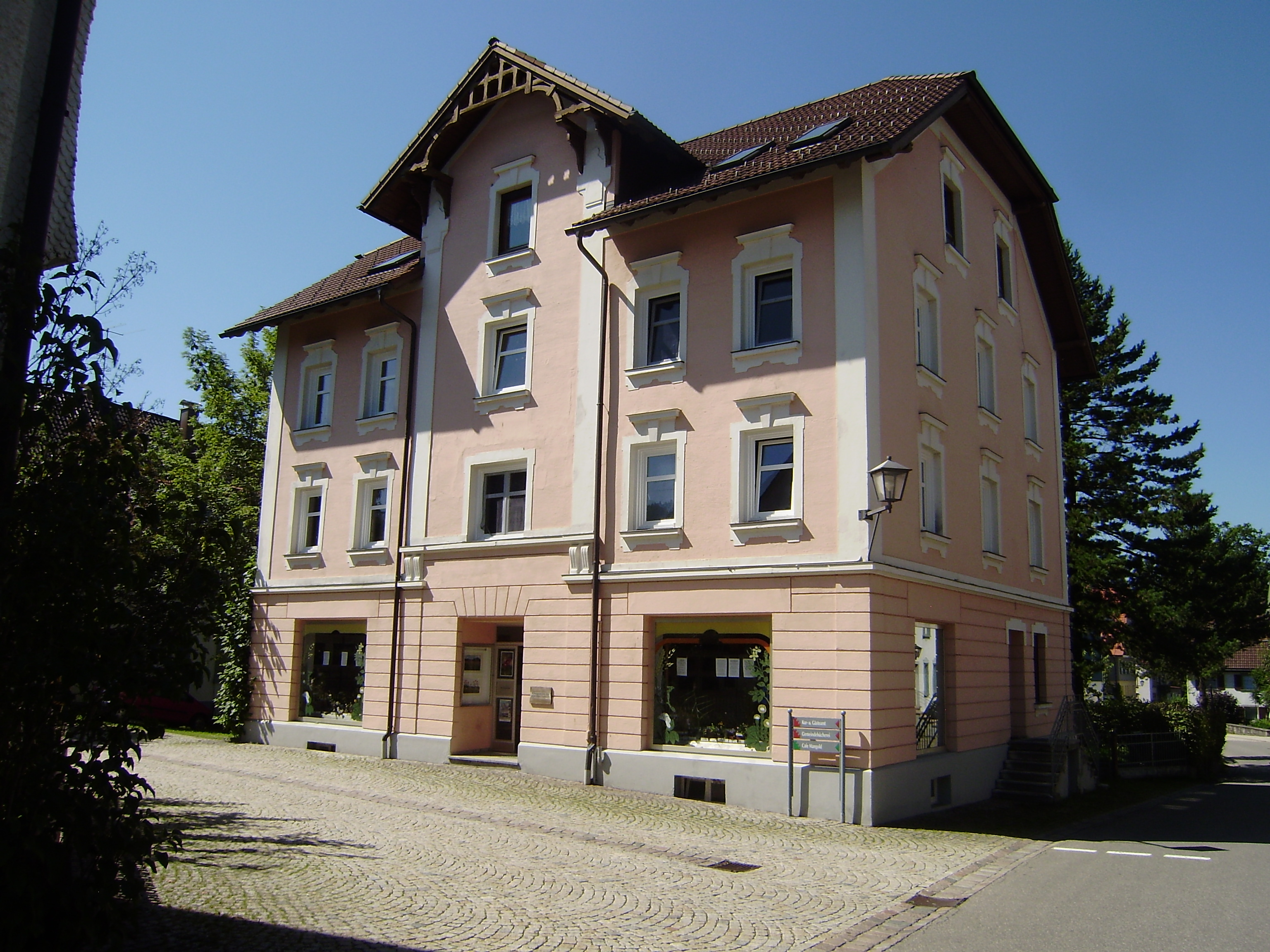 Wohn- und Kaufhaus Friedrich Heim in der Fridolin-Holzer-Straße 13, Weiler im Allgäu, Bayern, Deutschland (1902 errichtet von Baumeister Georg Bufler), 1968-1977 Hummelsche Apotheke unter Norbert Hummel, seit 1980 Pflanzenkundliche Schausammlung Prof. Karl Hummel